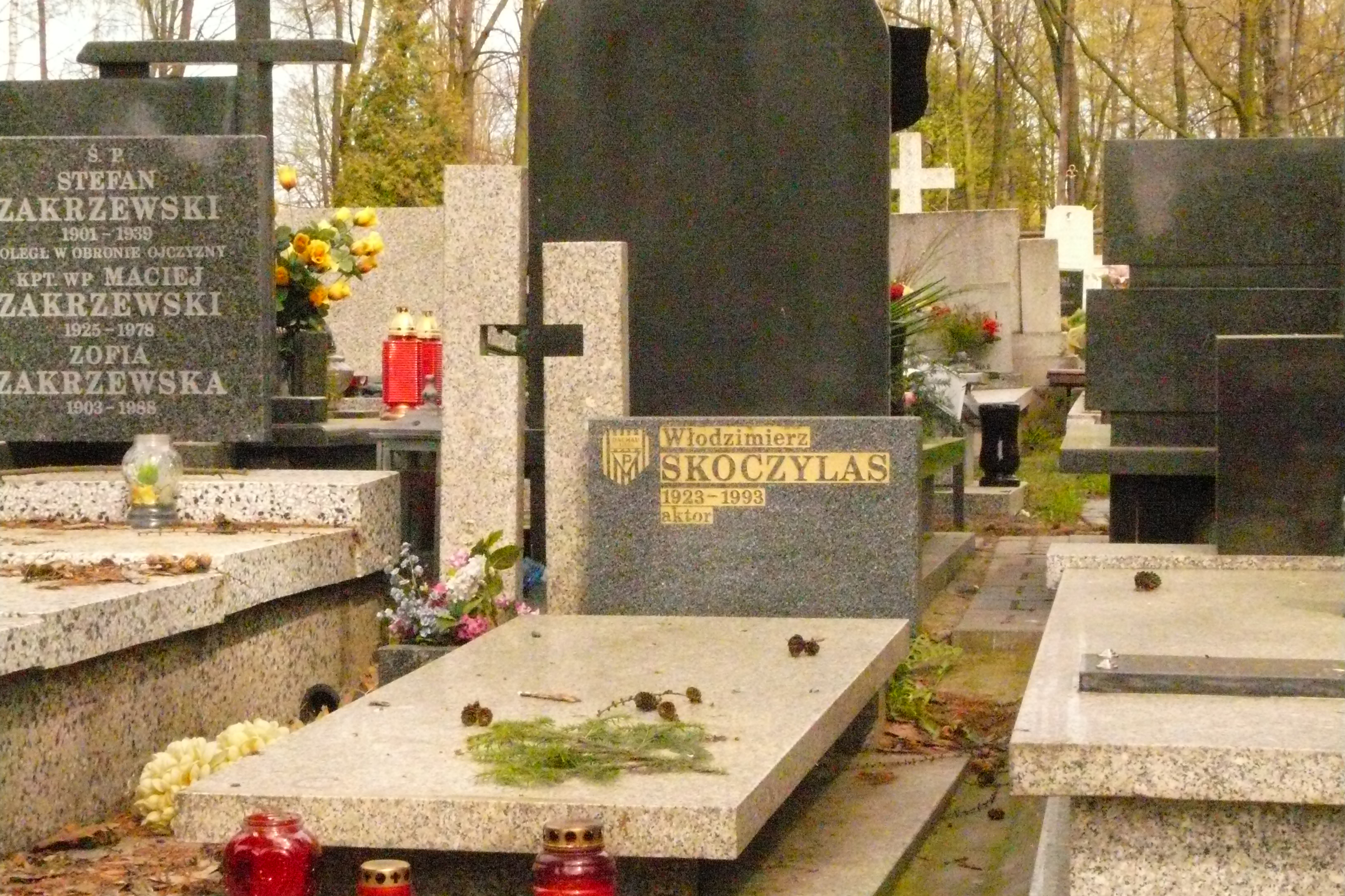 Grób aktora Włodzimierza Skoczylasa na cmentarzu na Radogoszzcu w Łodzi